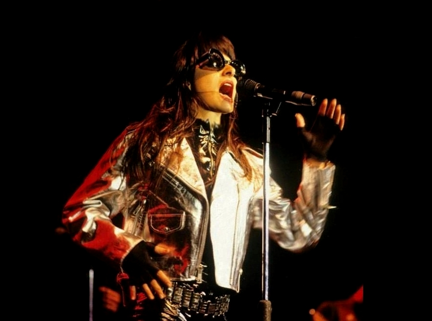 Cantora Fernanda Abreu durante a turnê De SLA, em 1990. Foto: Alice Abreu: Assessoria de Imprensa Fernanda Abreu